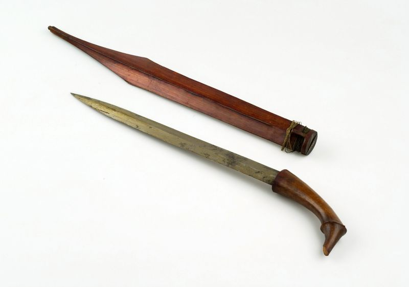 Dolk. Dolk met houten schede